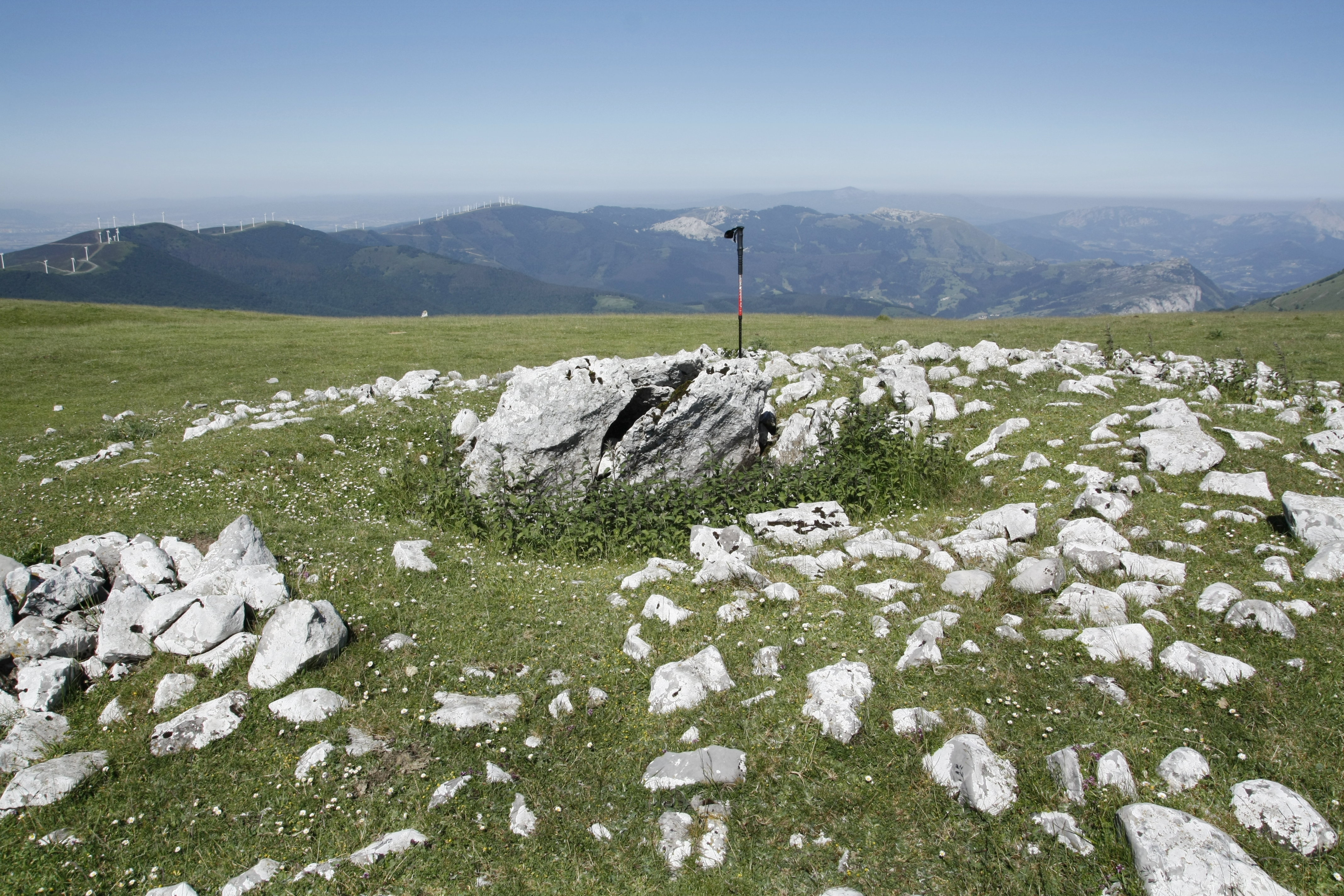 Artzanburu trikuharria